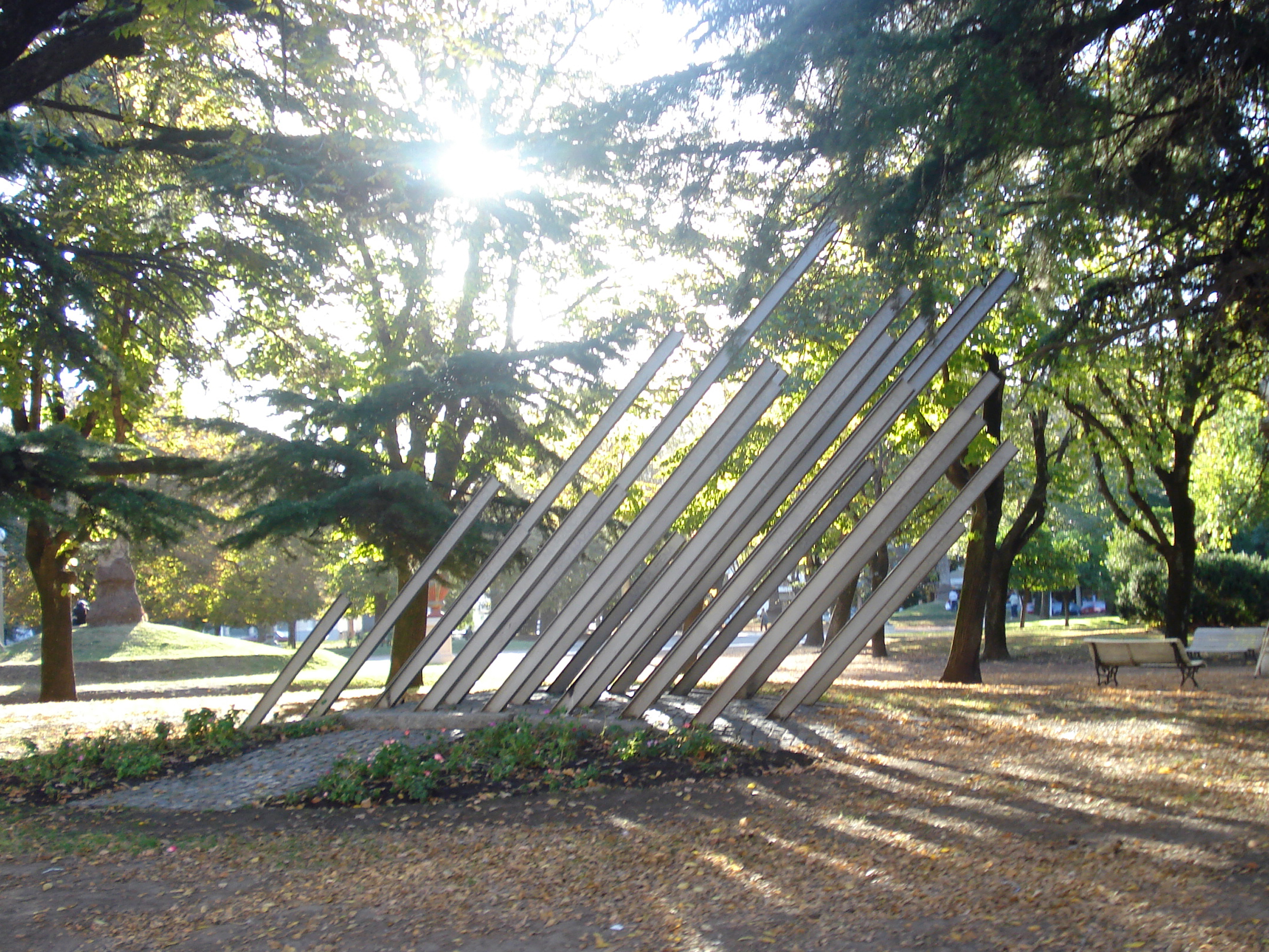 Monumento a los Desaparecidos en la ciudad de Tandil, Buenos Aires, Argentina.